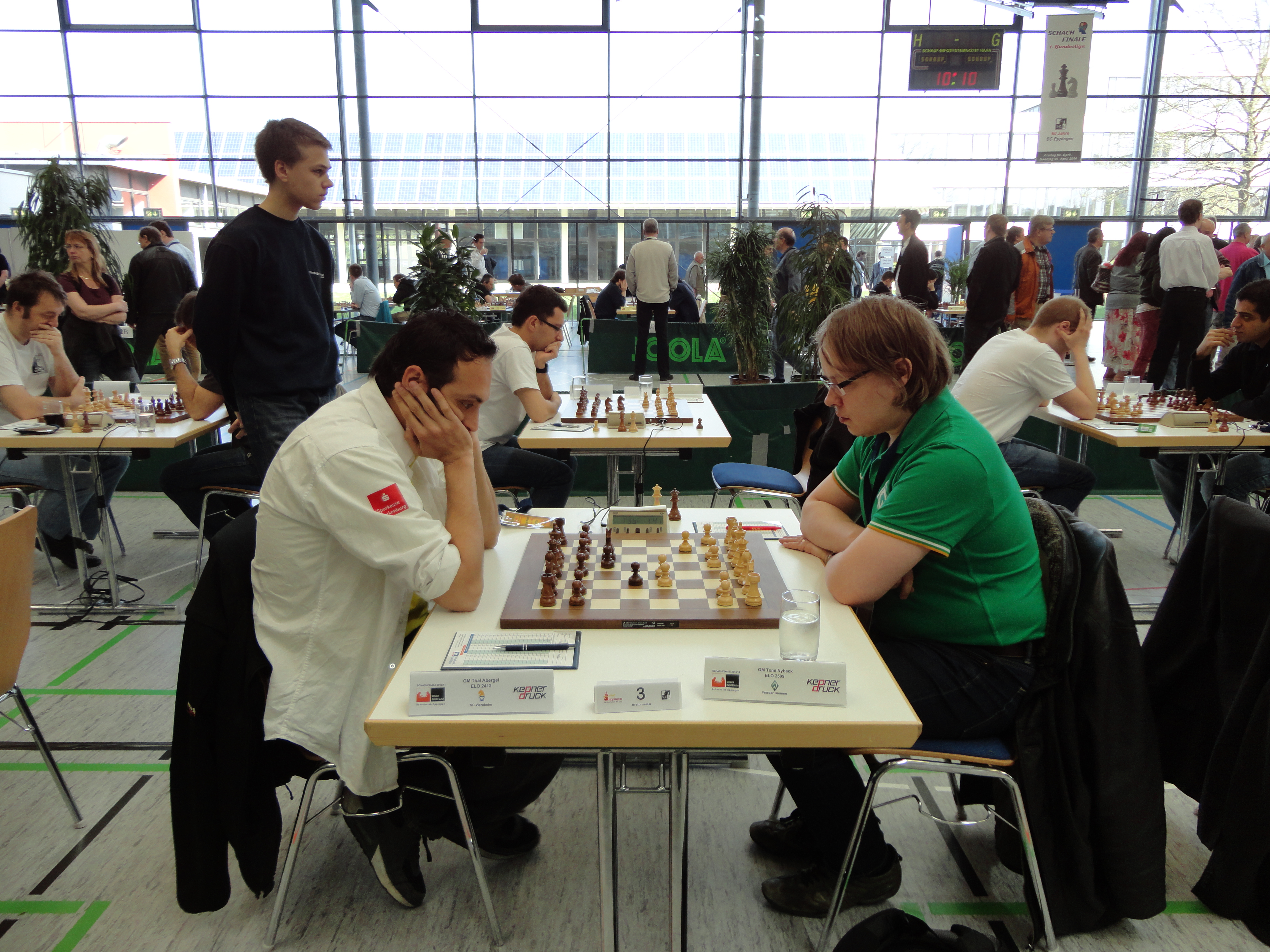 Im Vordergrund: Thal Abergel und Tomi Nyback (rechts), Finale der Deutschen Schachbundesliga Saison 2013/2014 in der Hardwaldhalle Eppingen.